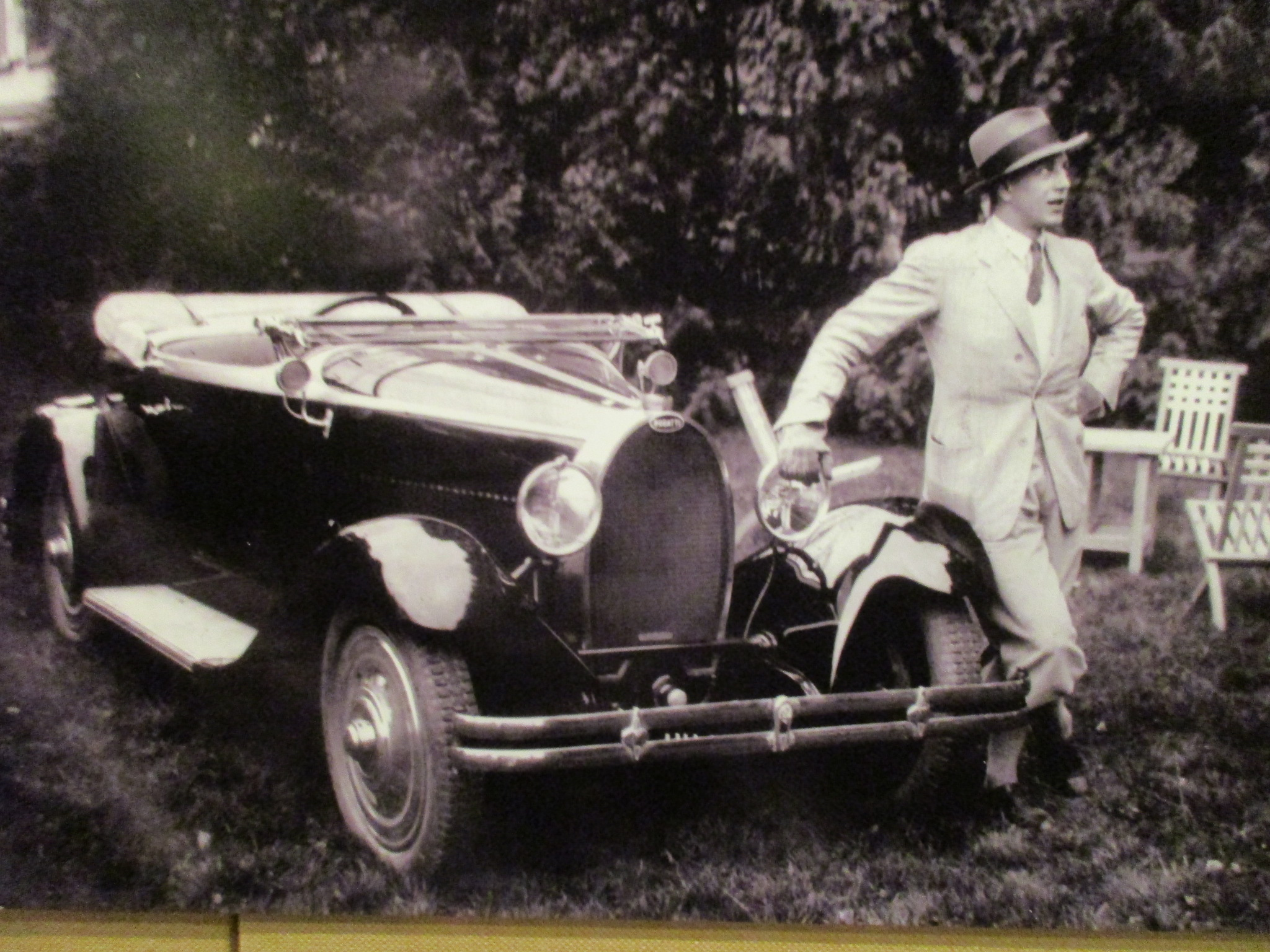 Jean Bugatti en 1930, dans le parc de la villa Bugatti de Molsheim-Dorlisheim. Photo du Musée Bugatti Molsheim